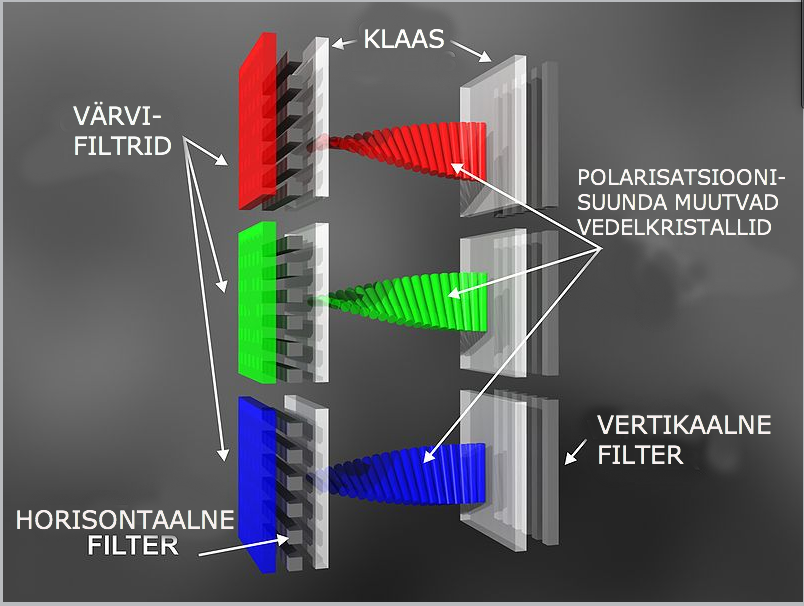 Tõlge